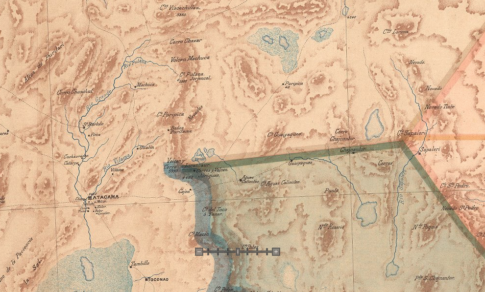 Río Zapalieri, San Pedro de Atacama, Cerro Chajnantor en un mapa de Carlos de Chapeaurouge publicado en 1901